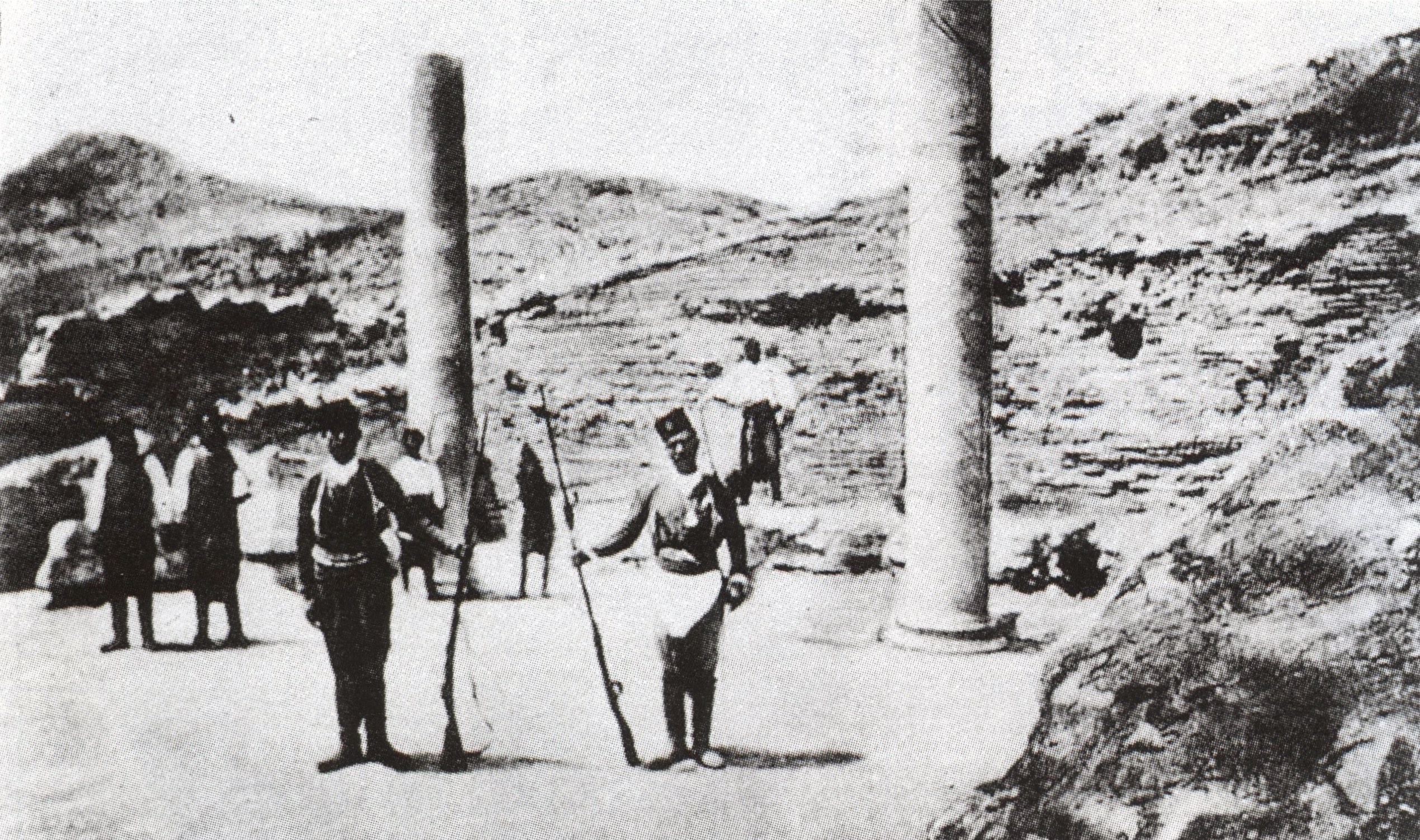 Asklepios-Heiligtum des antiken Leben (Λεβήν) in Lendas zur Zeit der Ausgrabungen mit kretischen Gendarmen